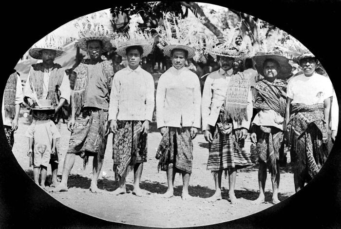 Repronegatief. Een groep mannen van Roti met hun bijzondere hoofddeksels